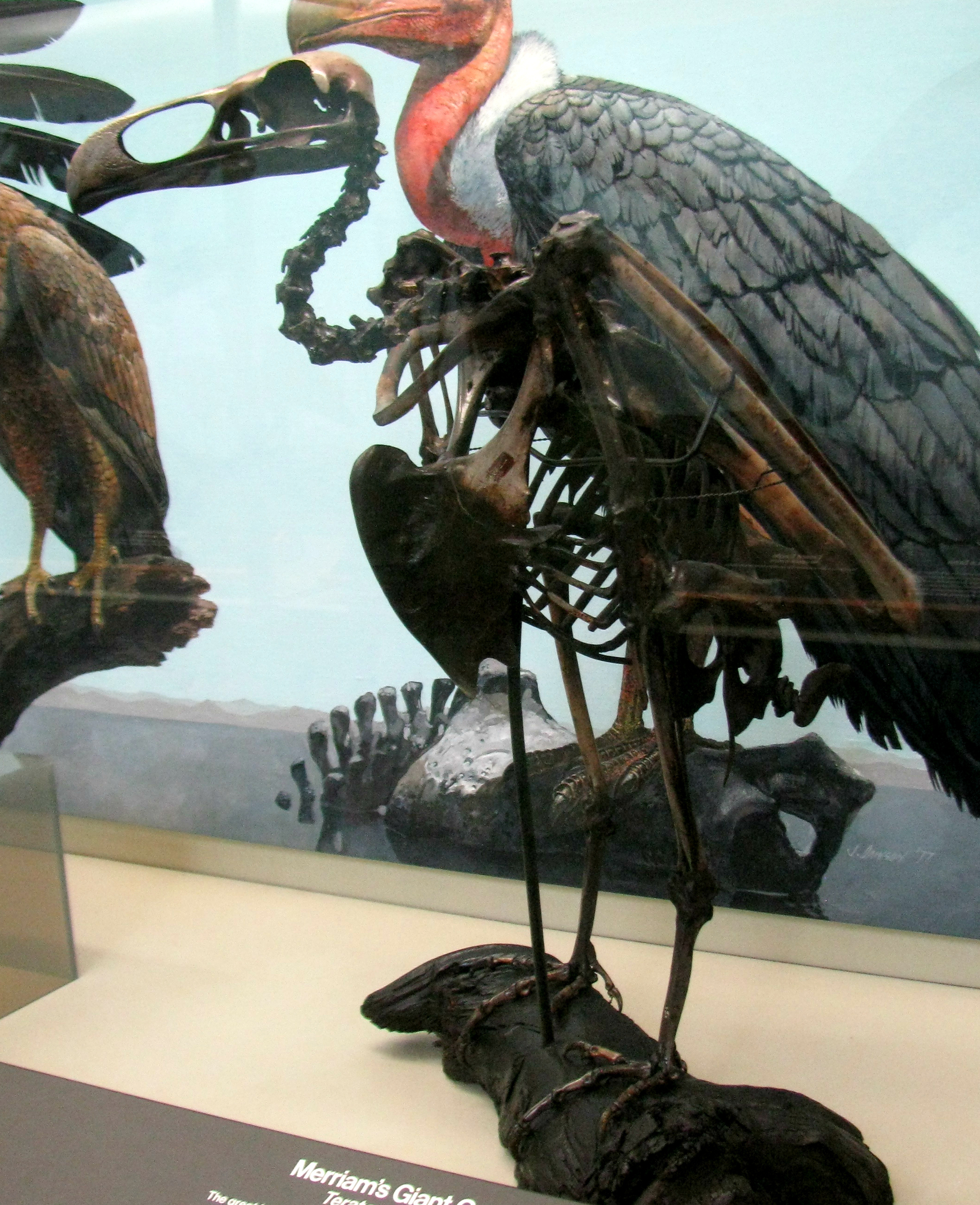 Giant Condor